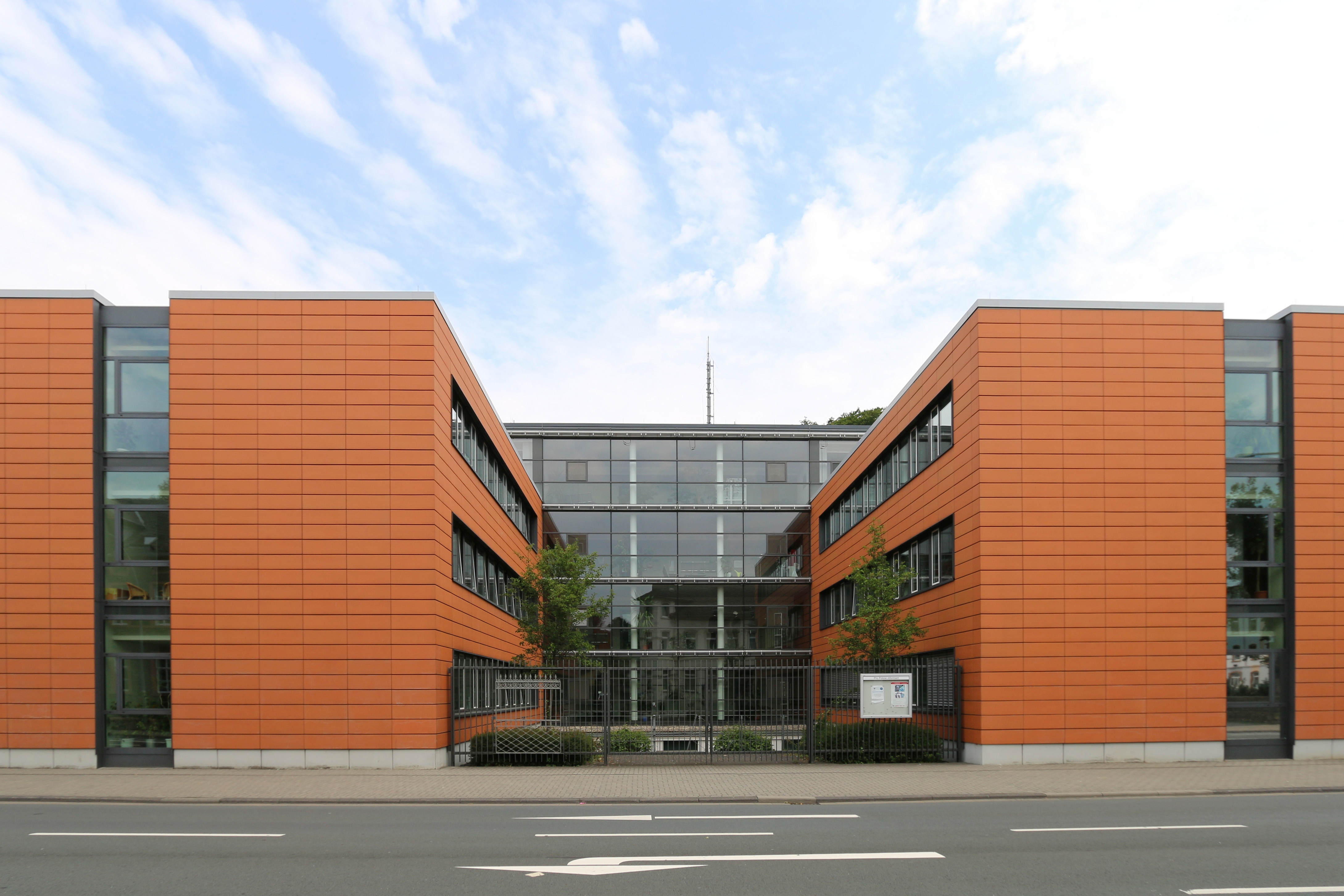 Dillenburg, Lahn-Dill-Kreis: Polizeistation Dillenburg